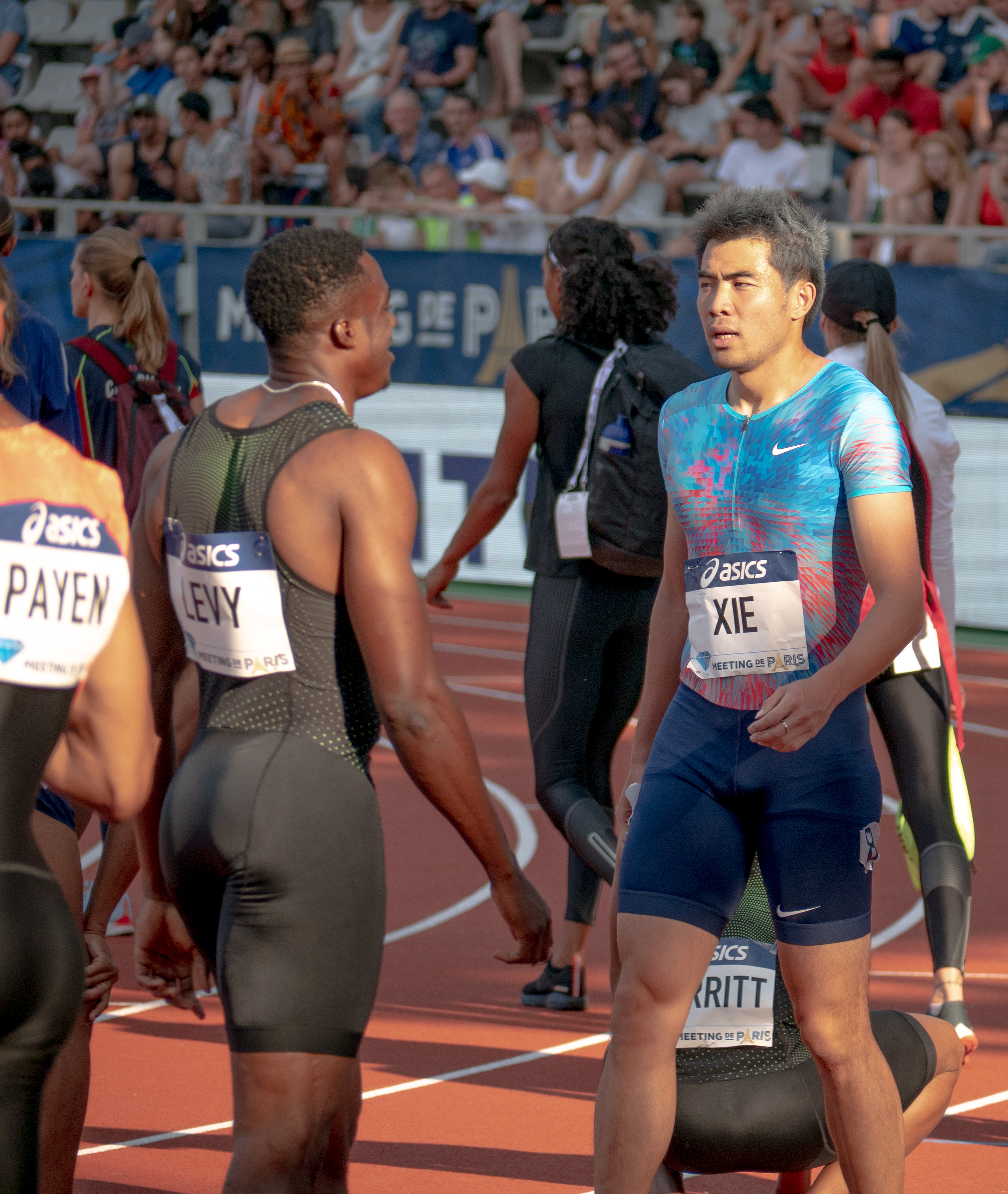 Wenjun Xie et Ronald Levy